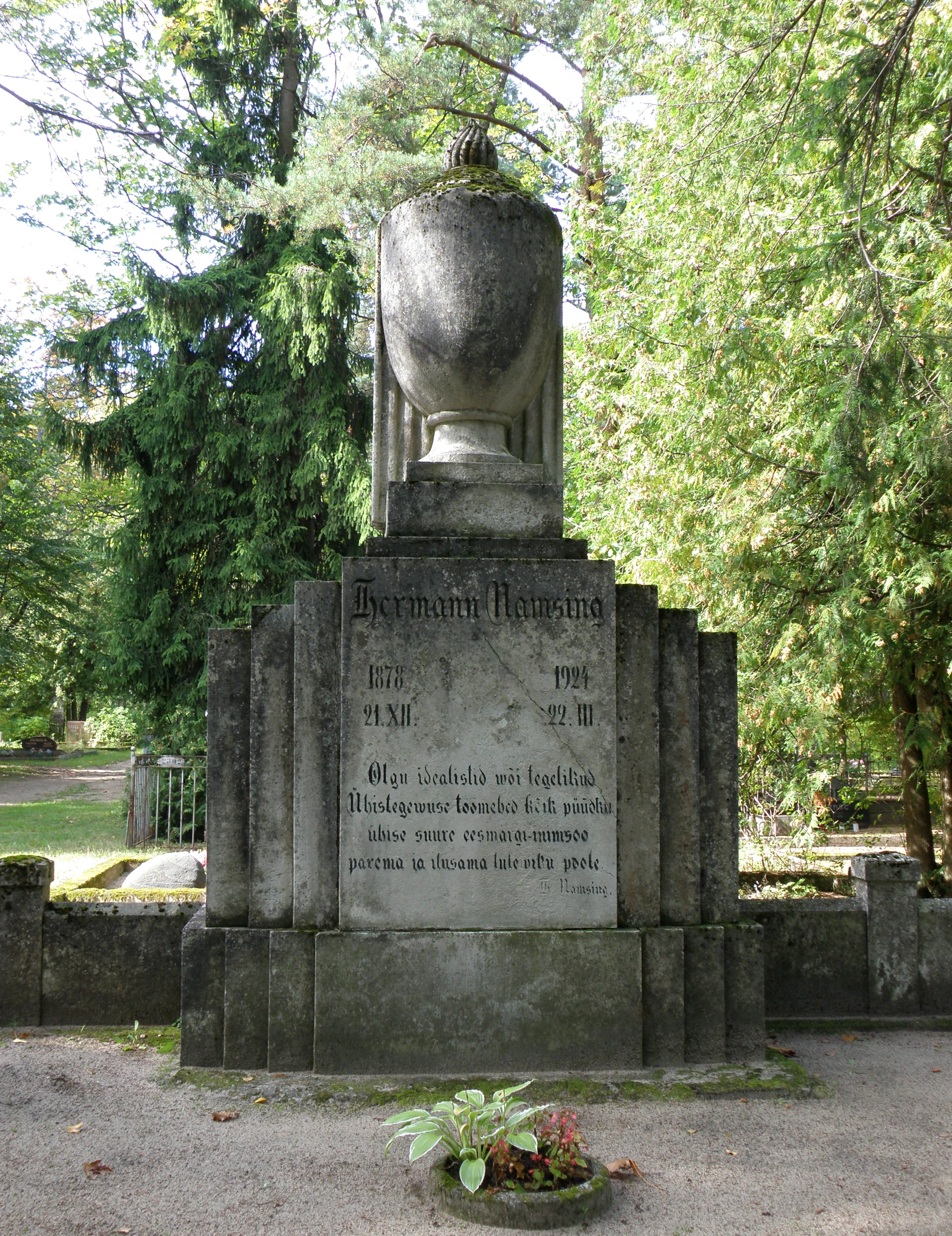 H. Namsingi hauamonument